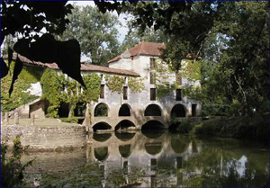 Description : moulin de Loubens sur la rivière « le Dropt » Source : photo personnelle